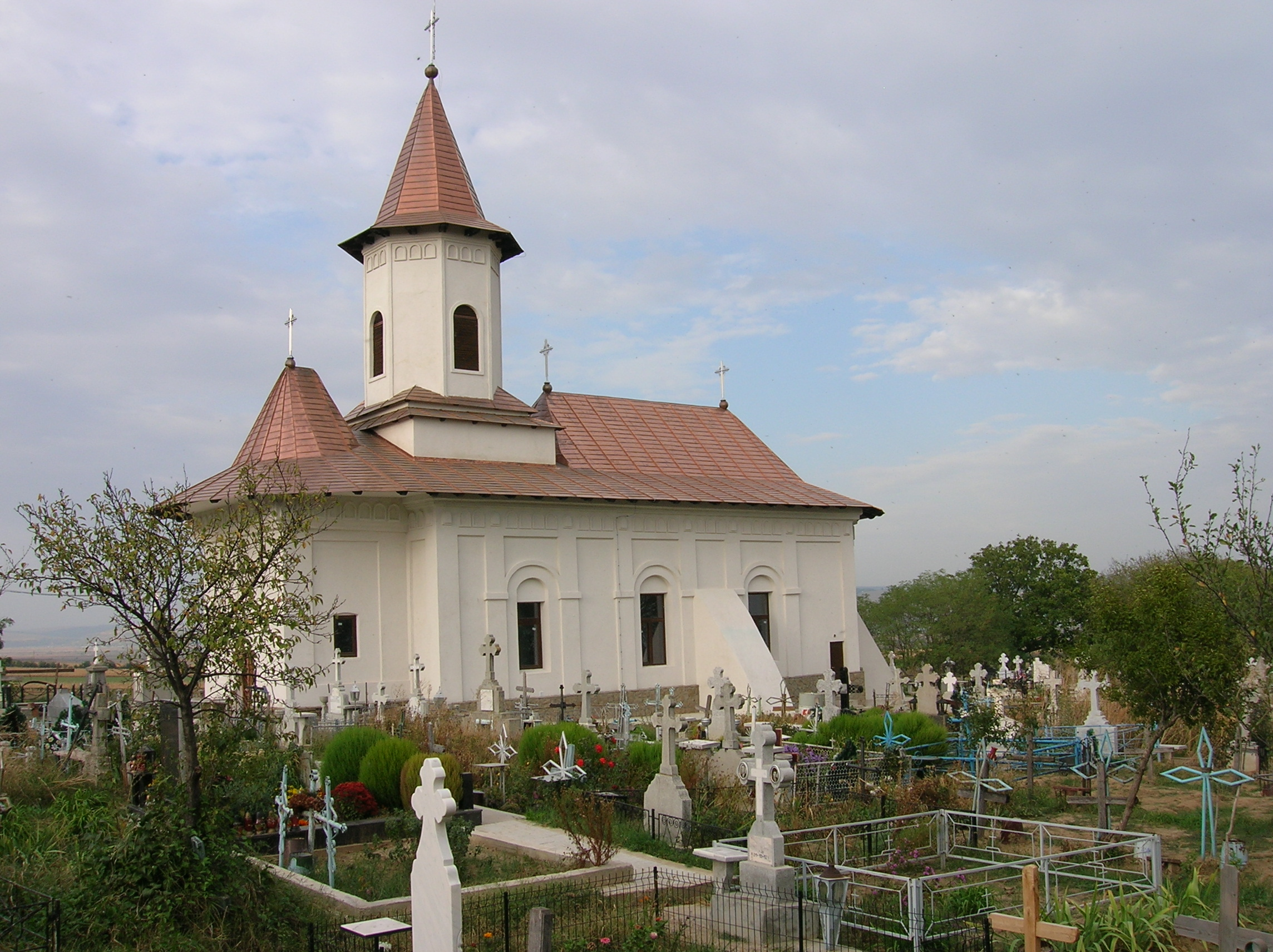 Comuna Valea Seacă Bacău - Satul Mândrişca - Biserica Sfântul Ierarh Nicolae